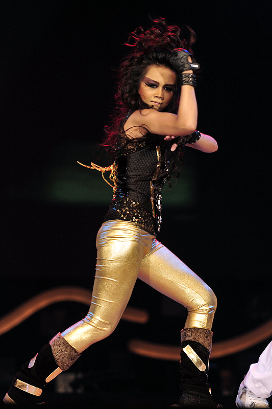 Anugerah Juara Lagu 23